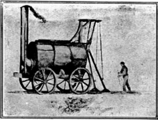 Bruntons Traveller 2